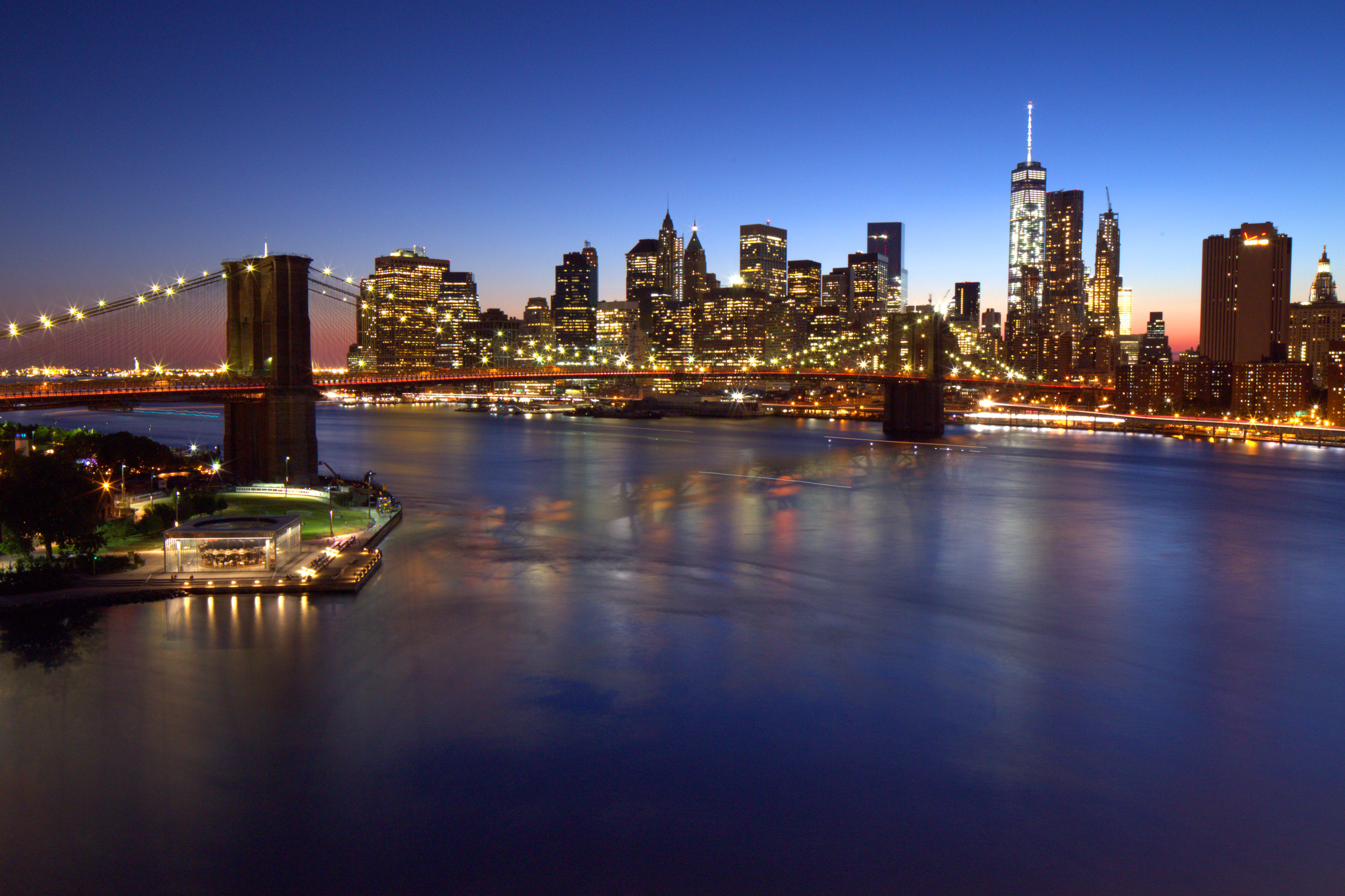 English, Français, Español, Italiana, 日本語, 中國 This is a photo of the Brooklyn Bridge, Manhattan, and One World Trade Center. The photo was taken from the Manhattan Bridge about half an hour after sunset with clear skies. The very small Statue of Liberty can be seen to the left of the bridge tower on the horizon. Ceci est une photo du pont de Brooklyn , Manhattan , et One World Trade Center . La photo a été prise à partir du pont de Manhattan environ une demi-heure après le coucher du soleil avec un ciel clair . La très petite statue de la Liberté peut être vu à la gauche de la tour de pont sur l'horizon . Esta es una foto del puente de Brooklyn , Manhattan, y One World Trade Center. La foto fue tomada desde el puente de Manhattan alrededor de media hora después del atardecer con cielo despejado . La pequeña estatua de la libertad se puede ver a la izquierda de la torre del puente en el horizonte. Questa è una foto del ponte di Brooklyn , Manhattan , e One World Trade Center . La foto è stata scattata dal ponte di Manhattan circa mezz'ora dopo il tramonto con cielo sereno . La piccola statua di libertà può essere visto alla sinistra della torre ponticello all'orizzonte . これは、ブルックリン橋、マンハッタン、およびワンワールドトレードセンターの写真です。写真は晴天と日没後約30分マンハッタン橋から採取しました。リバティの非常に小さな像は、地平線上に橋塔の左側に見ることができます。 這是布魯克林大橋，曼哈頓和世界貿易中心的照片。這張照片是取自曼哈頓大橋約一個半小時​​的夕陽與晴朗的天空之後。很小的自由女神像可以看出橋塔在地平線上的左側。 Canon 6D | Canon TS-E 24mm f/3.5L II | f20 | 24mm | 30sec | 500 ISO | LEE 0.9 Soft-Edge Grad ND filter